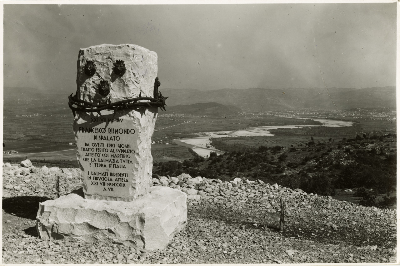 Monte S. Michele Cippo a Francesco Rismondo